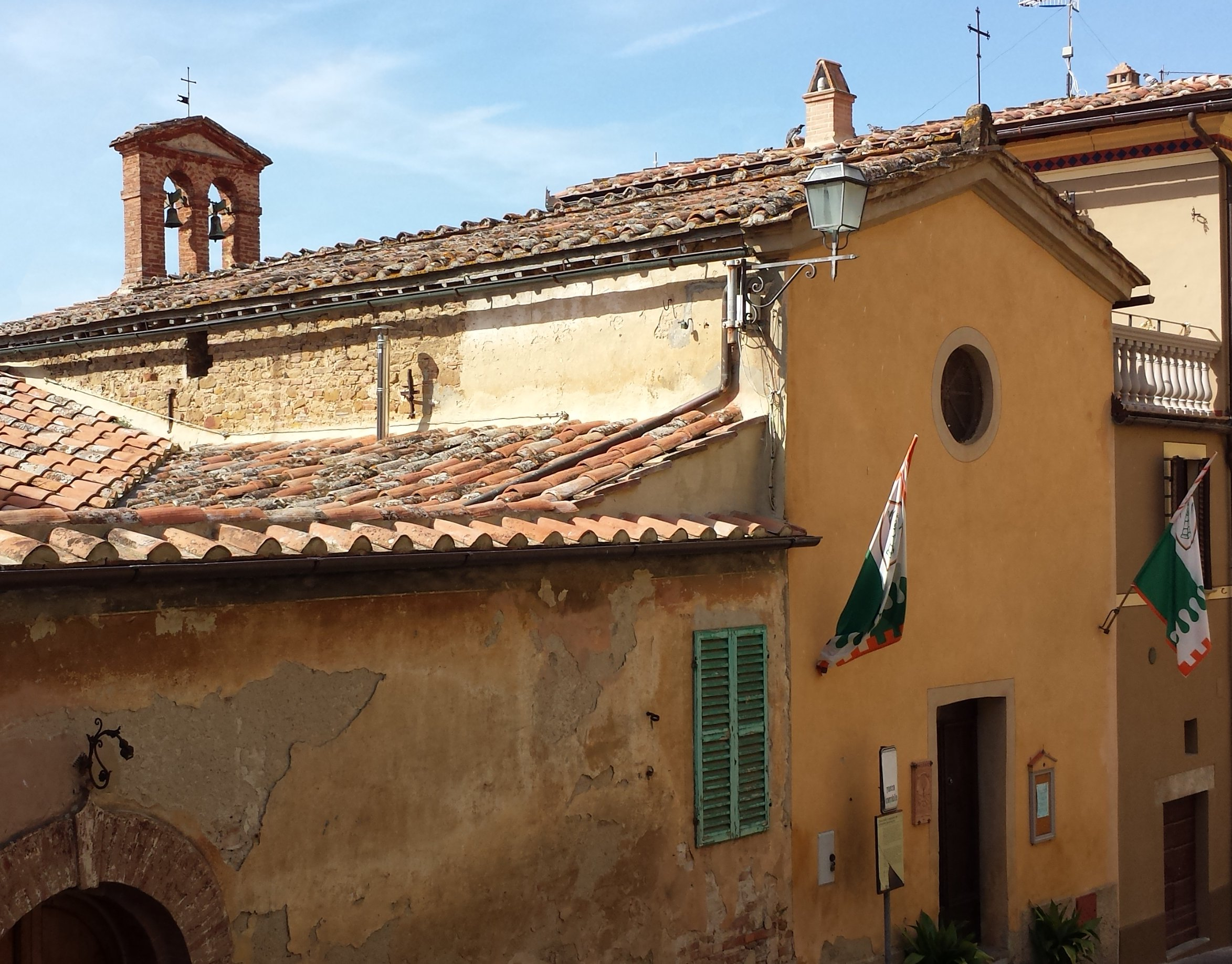 Veduta esterna dell'Oratorio di Sant'Antonio abate della Compagnia del Santissimo Sacramento in Montisi, provincia di Siena, ripreso dall'inizio della Salita del Castello.